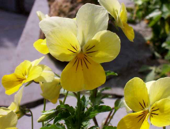 Gelbes Galmeiveilchen (viola lutea ssp. calaminaria)